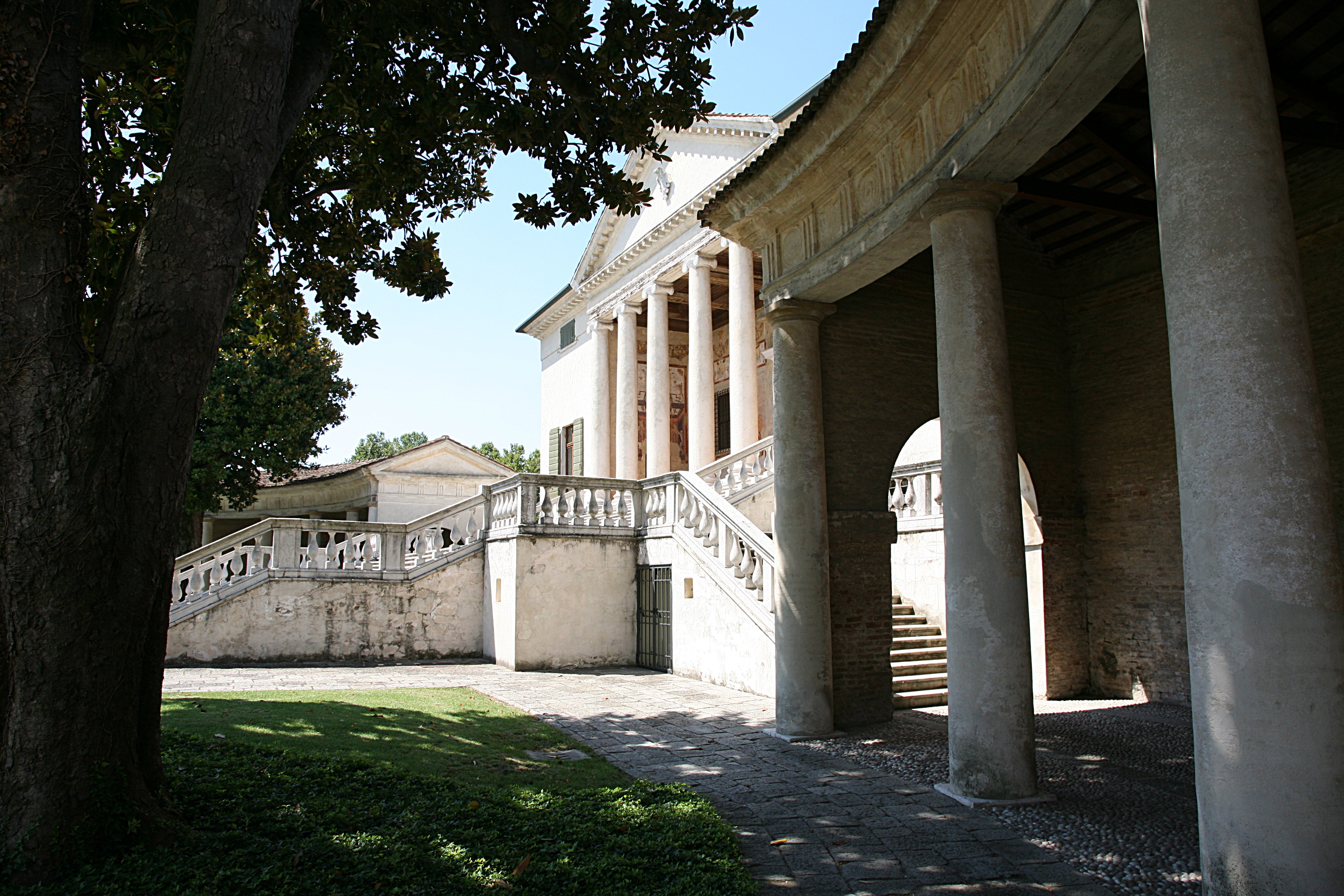 Villa Badoer by Andrea Palladio.